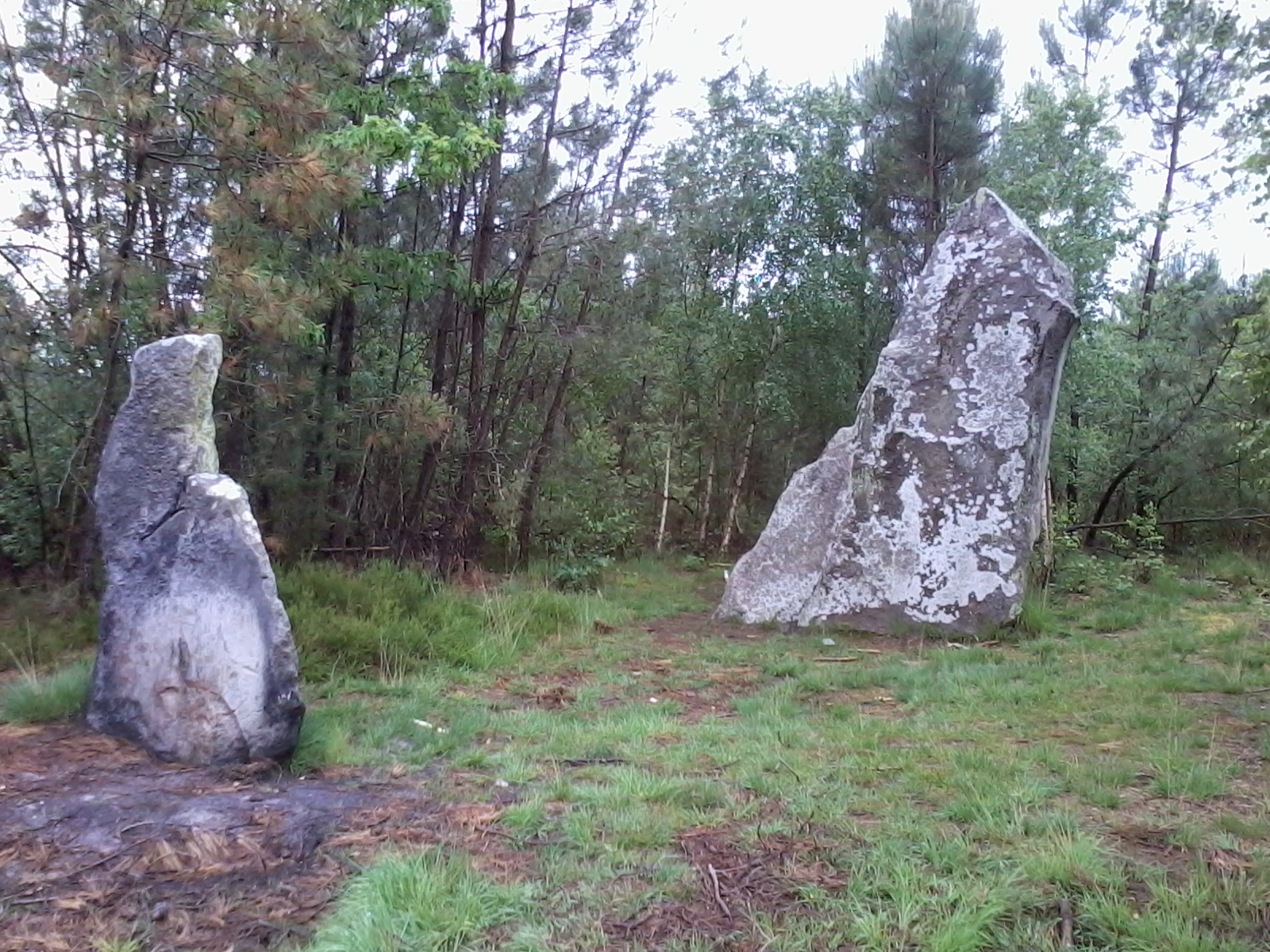 Menhirs de la Mère et la Fille